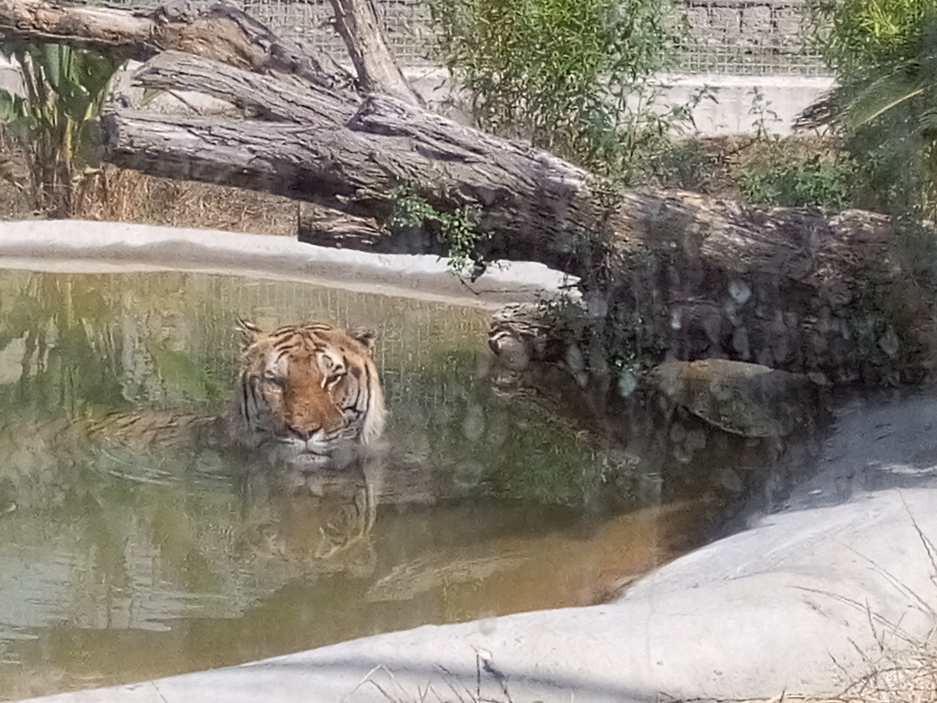 zoo di napoli